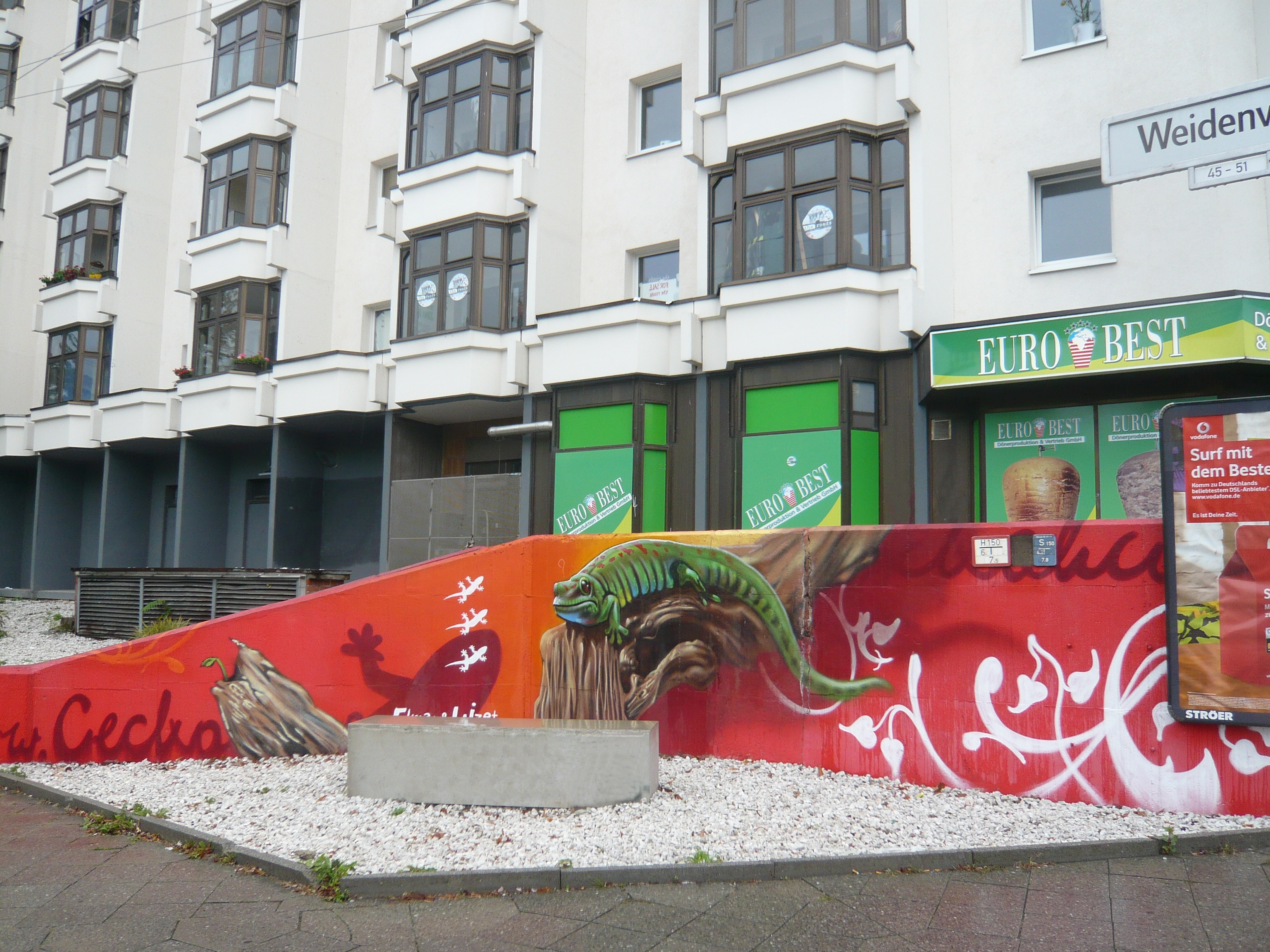 Bersarinplatz in Berlin-Friedrichshain: Randbebauung "Geckohaus"